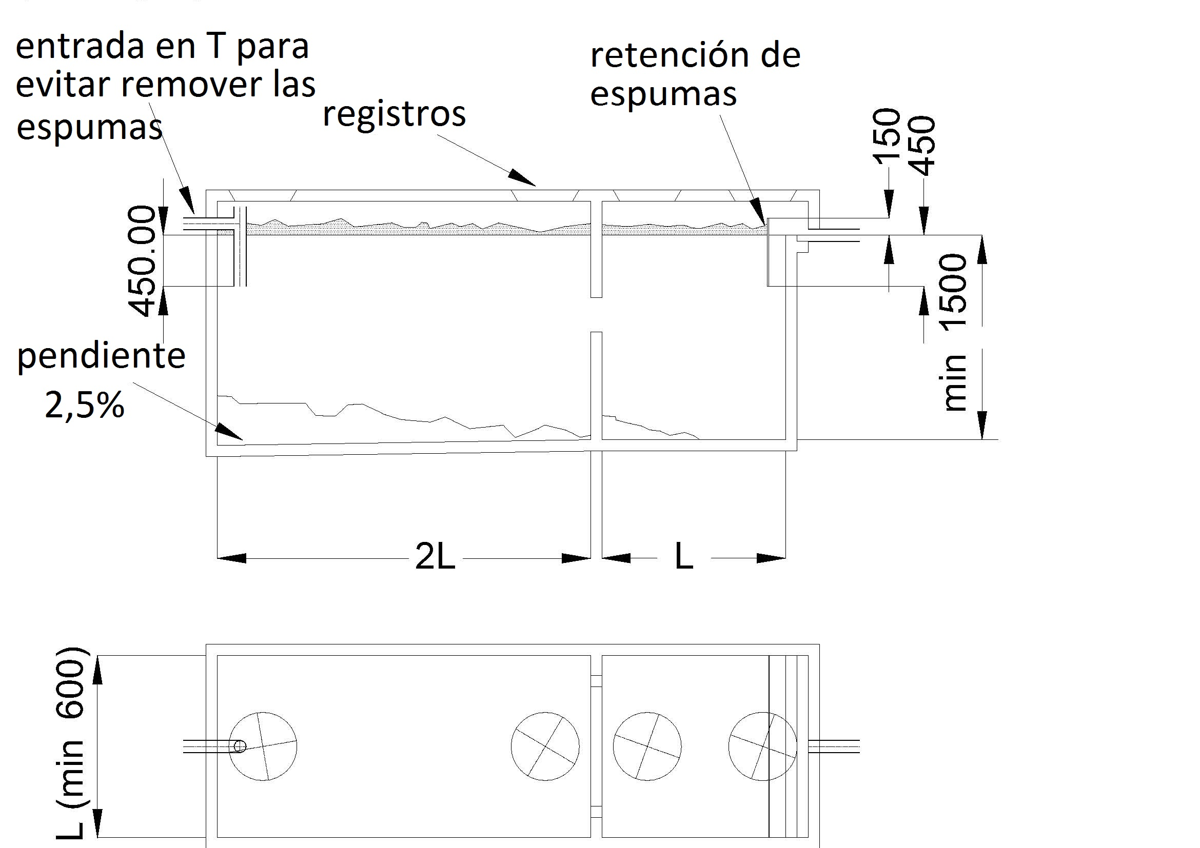 Imagen de Commons traducida al español